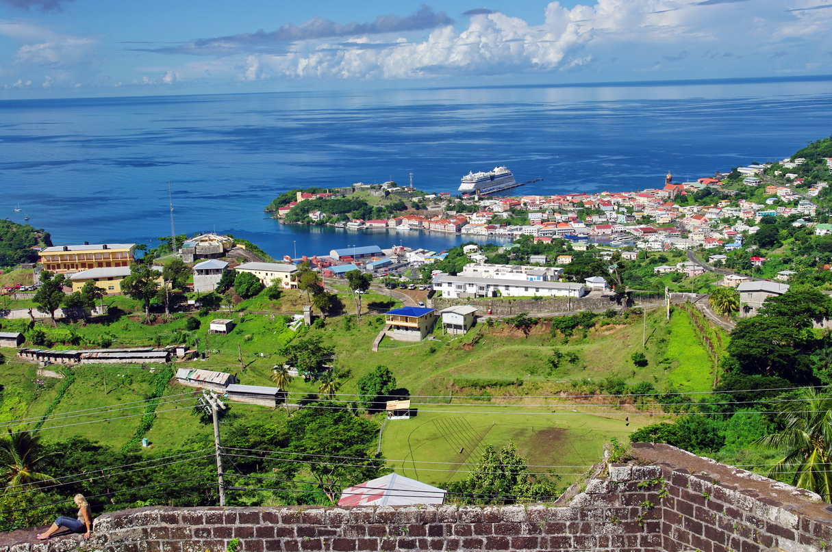 Blick auf St. George's vom Fort Frederick